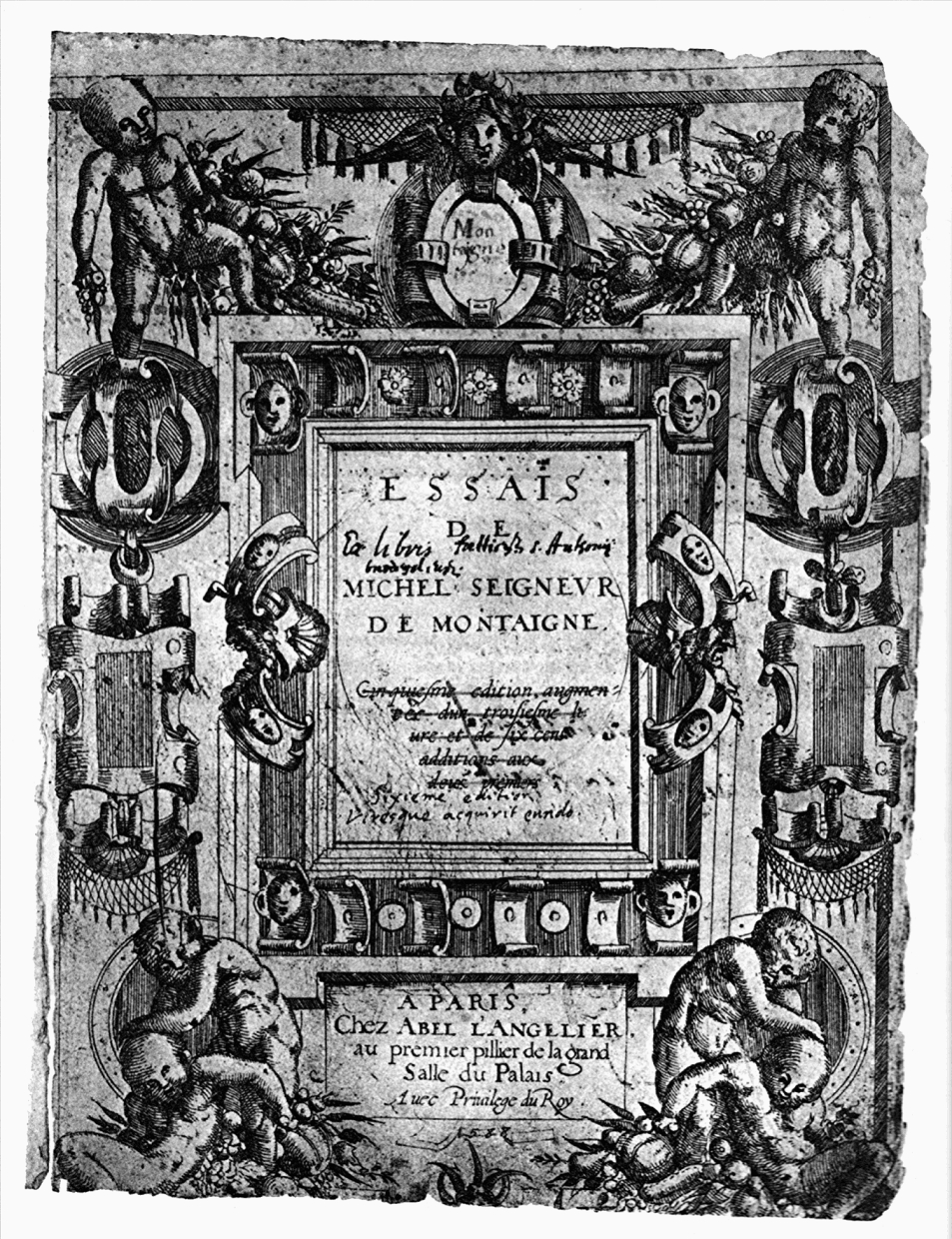 Titelblatt der Essais mit Notizen